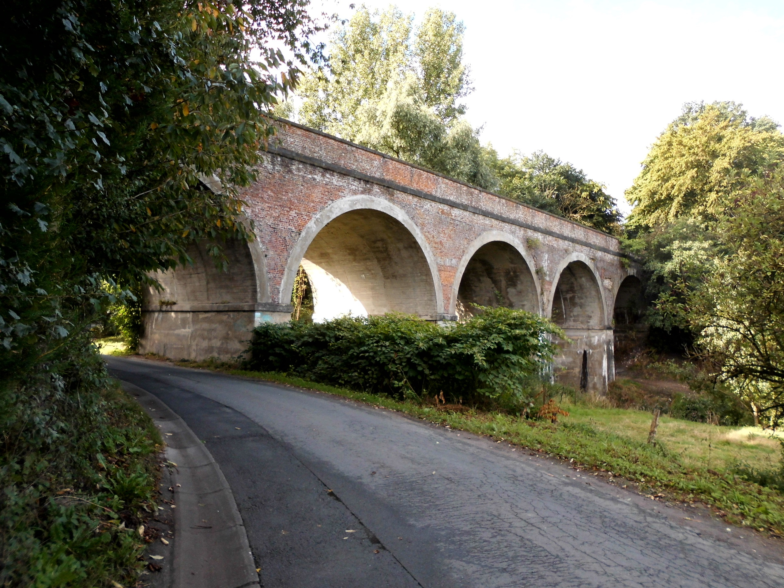 Spoorwegviaduct op Lijn 115 nabij Vallée des Oiseaux - Roosbeek - Rebecq - Vlaams-Brabant - België